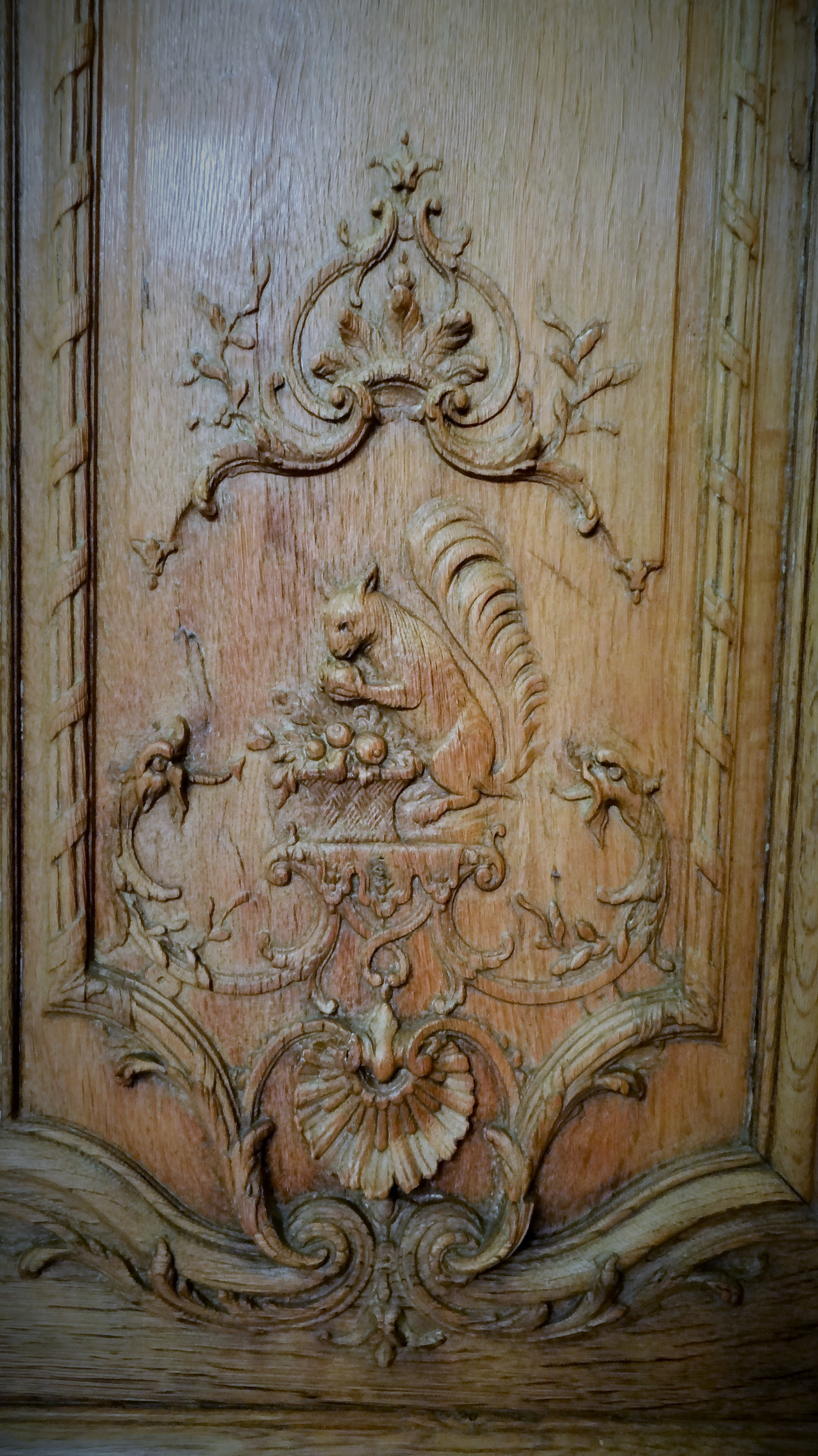 fable de La Fontaine, le renard et l'écureuil, Boiseries de la salle à manger de l'Hôtel de Noirmoutier, Paris .